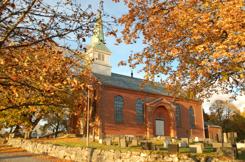 Degernes kirke, Rakkestad, Østfold, Norway